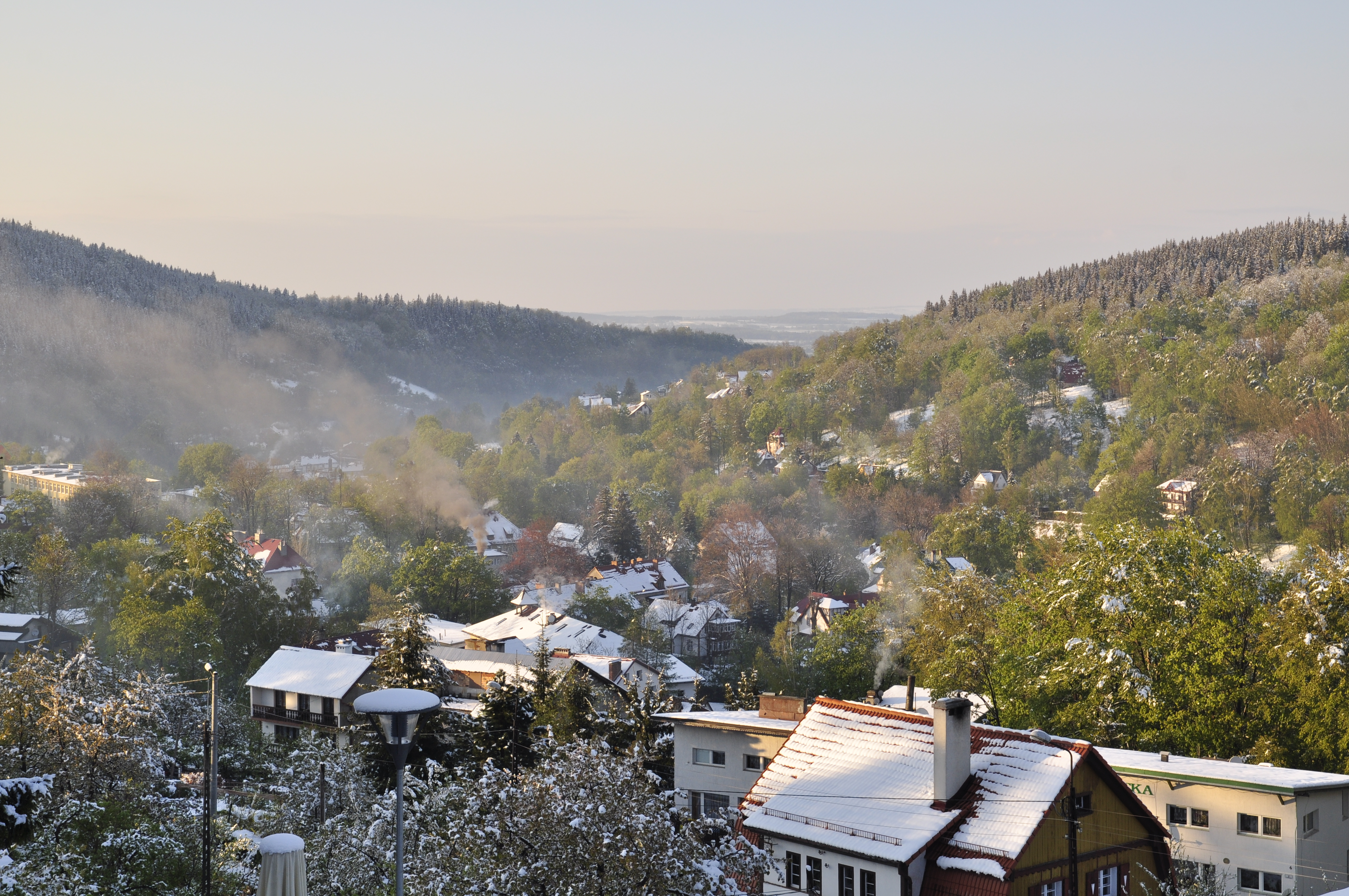 m. Świeradów-Zdrój, XVII-XIX 28.02.1980.